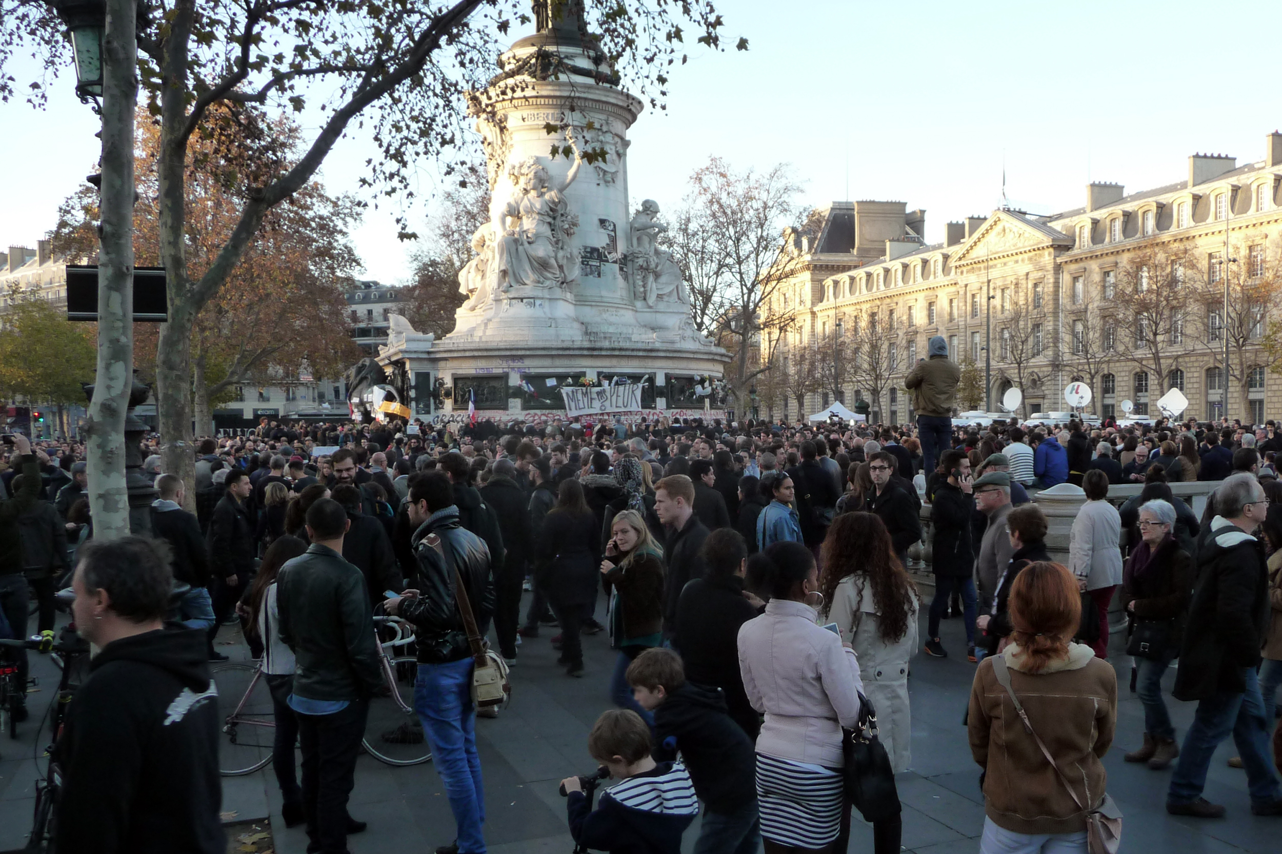 Rassemblement sur la place de la République le dimanche suivant les attentats du 13 novembre 2015 en France.